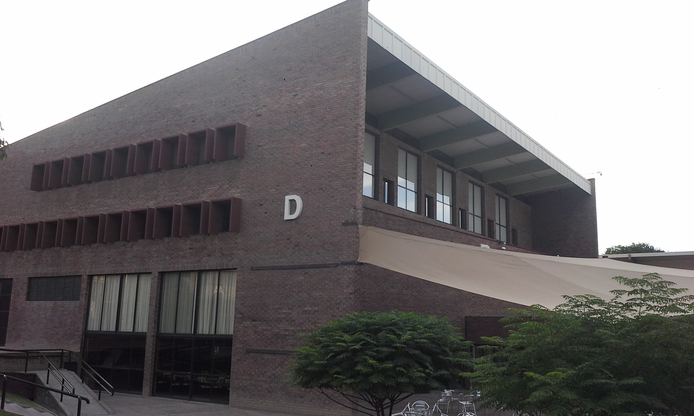 Fotografía del Edificio D de la Universidad Iberoamericana Torreón por la tarde